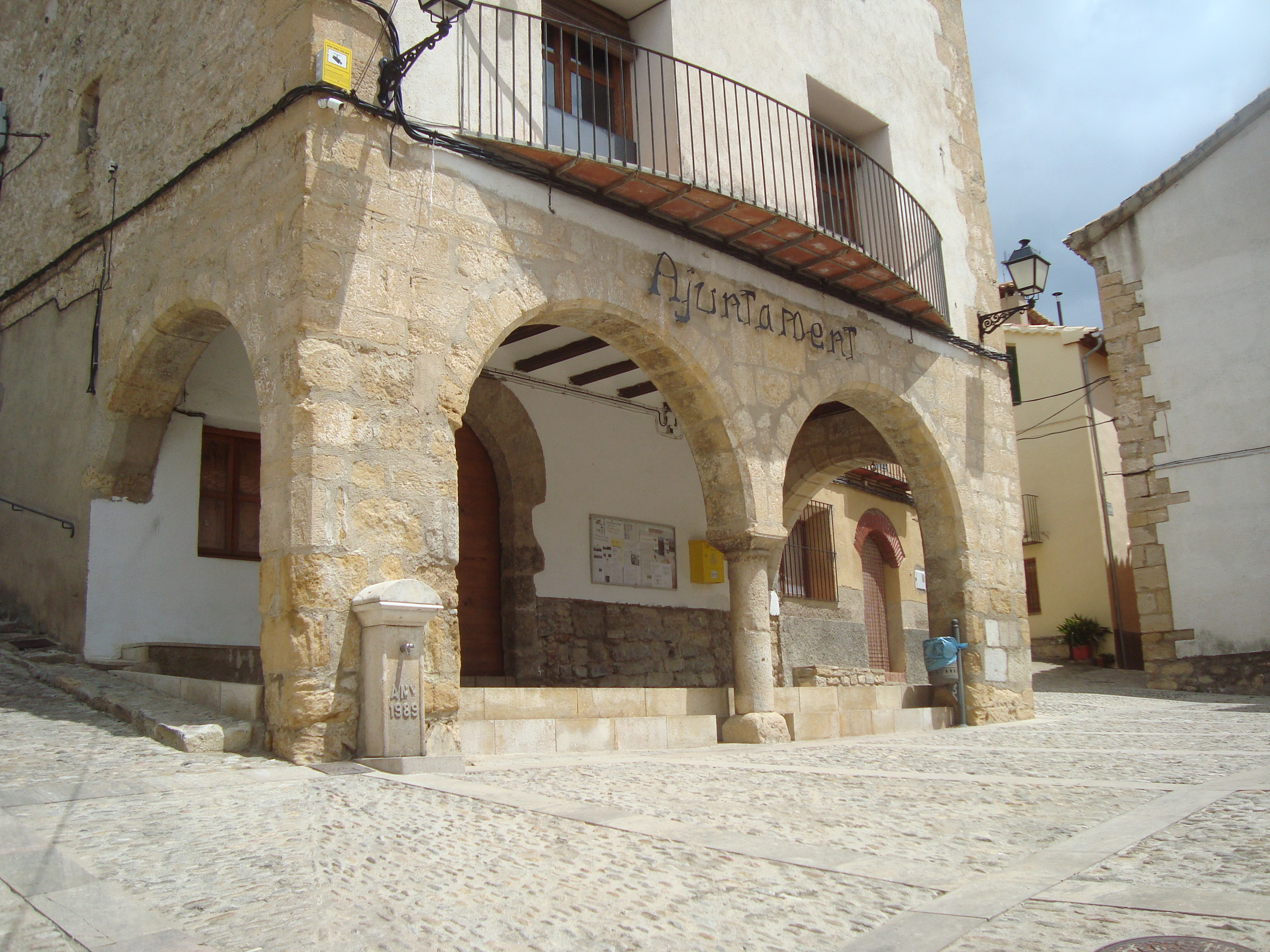 Ajuntament de Villores, comarca dels Ports (Castelló)